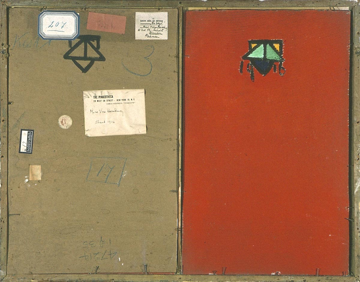 Achterzijde Danseressen, 1916.